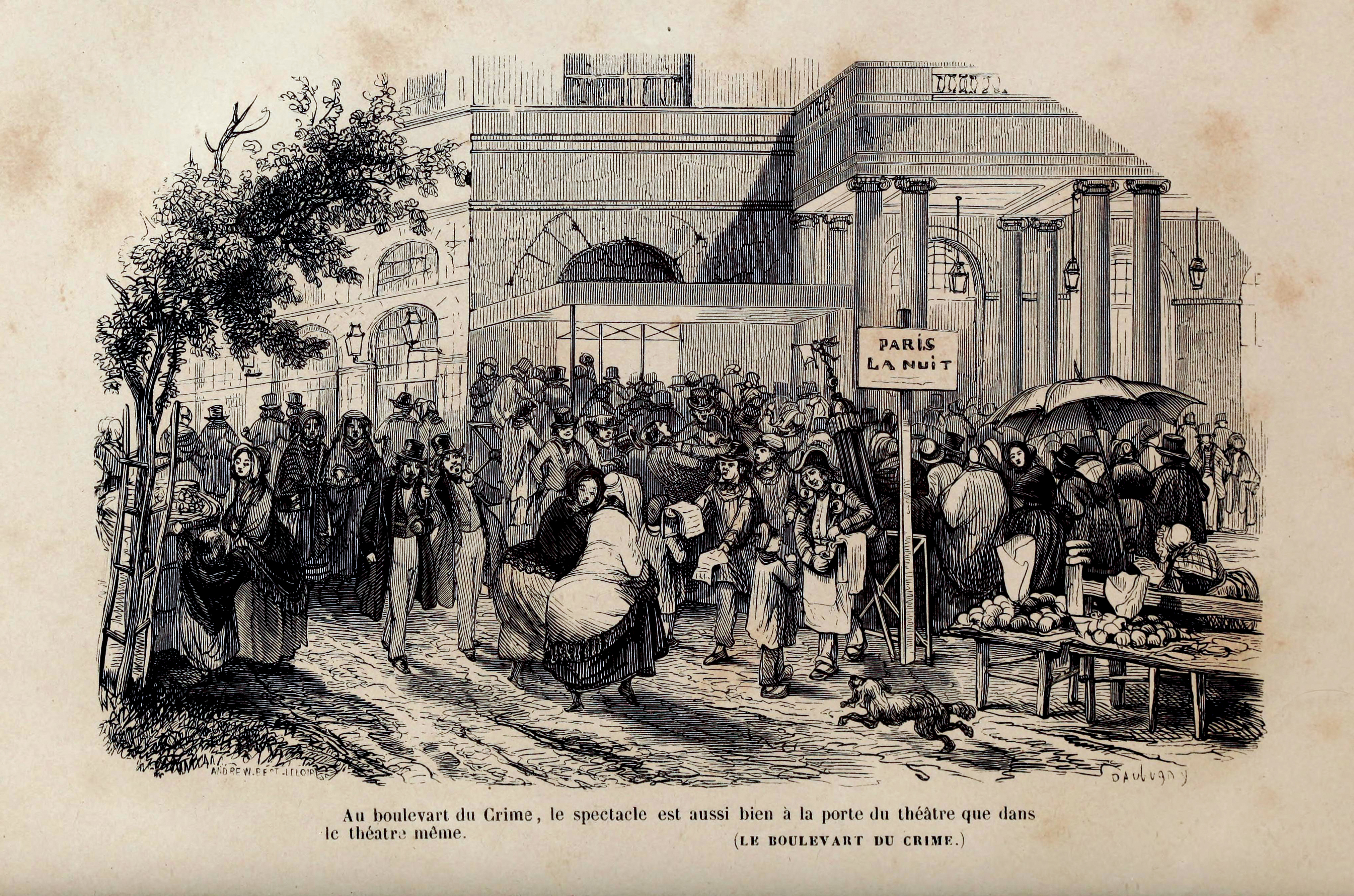 Illustration de La grande Ville.